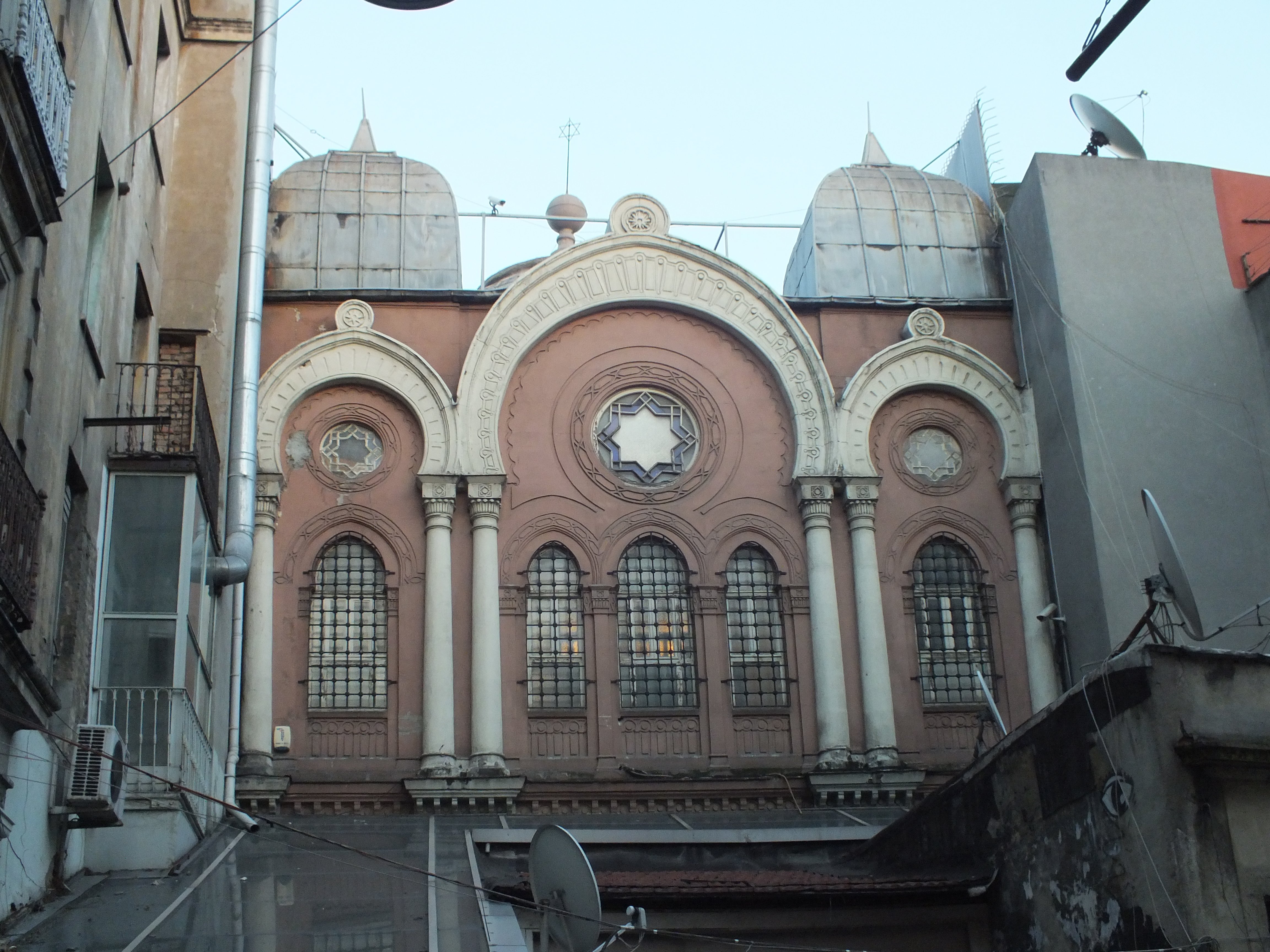 Eşkenazi Sinagogu